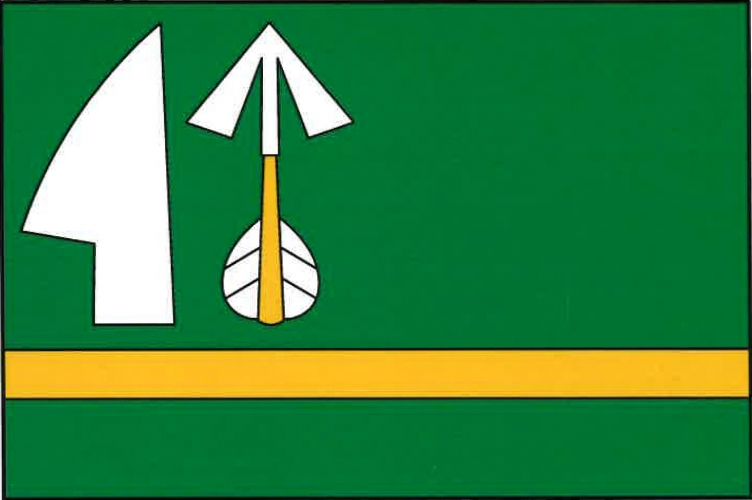 vlajka, Horní Slatina, okres Jindřichův Hradec